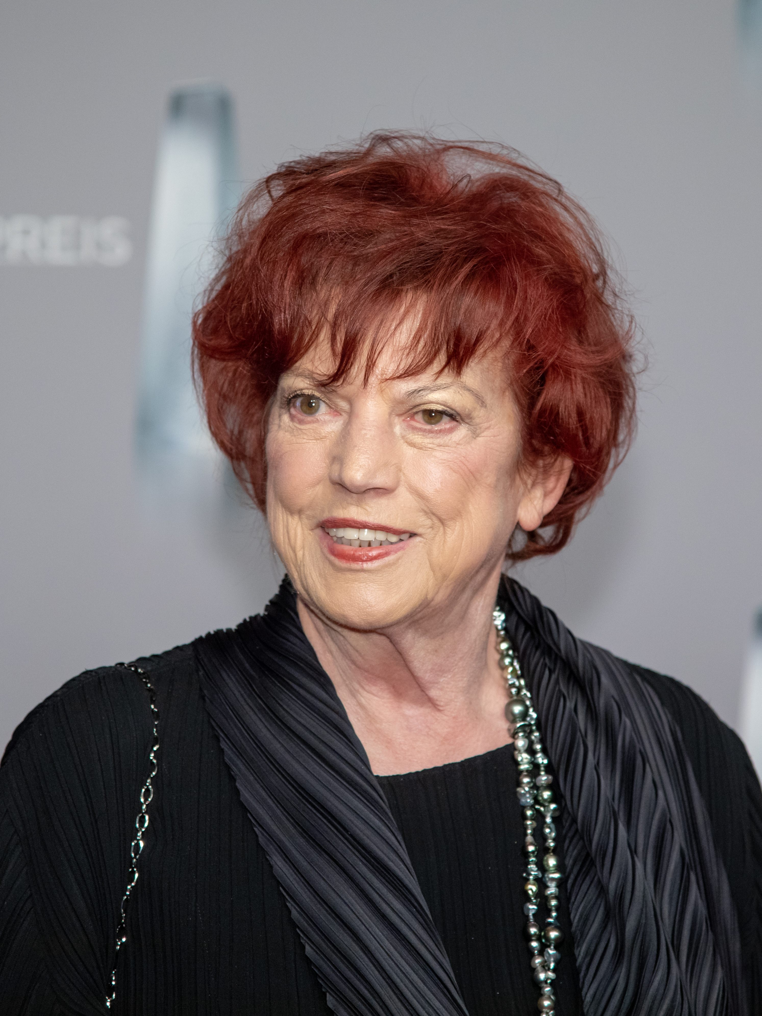 Regina Ziegler beim Deutschen Fernsehpreis 2019 in der Düsseldorfer Rheinterrasse